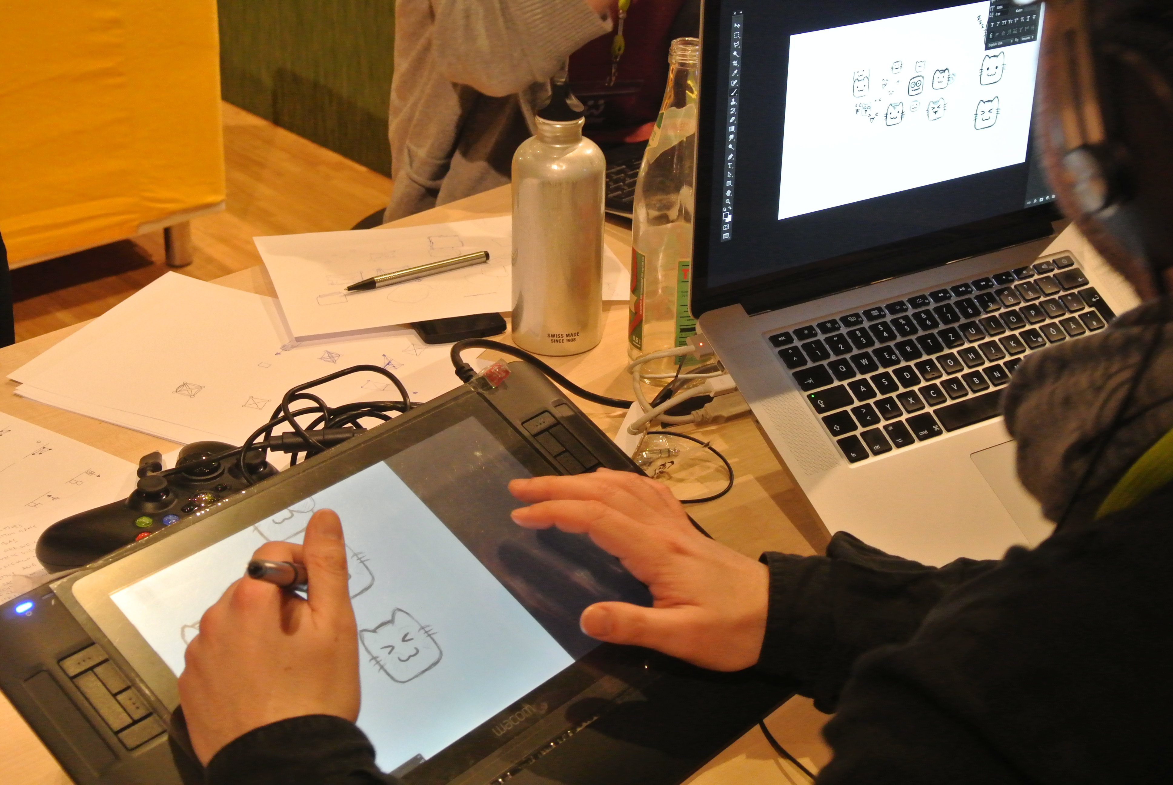 Global Game Jam Berlin 2014